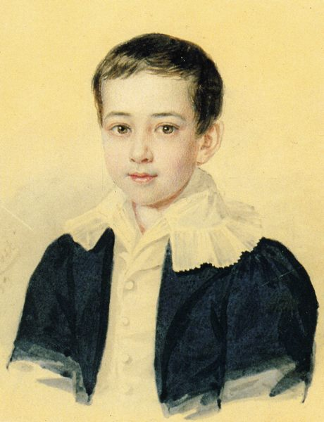 Граф Алексей Сергеевич Уваров (28.02.1825 - 29.12.1884), археолог, общ. деятель, меценат.